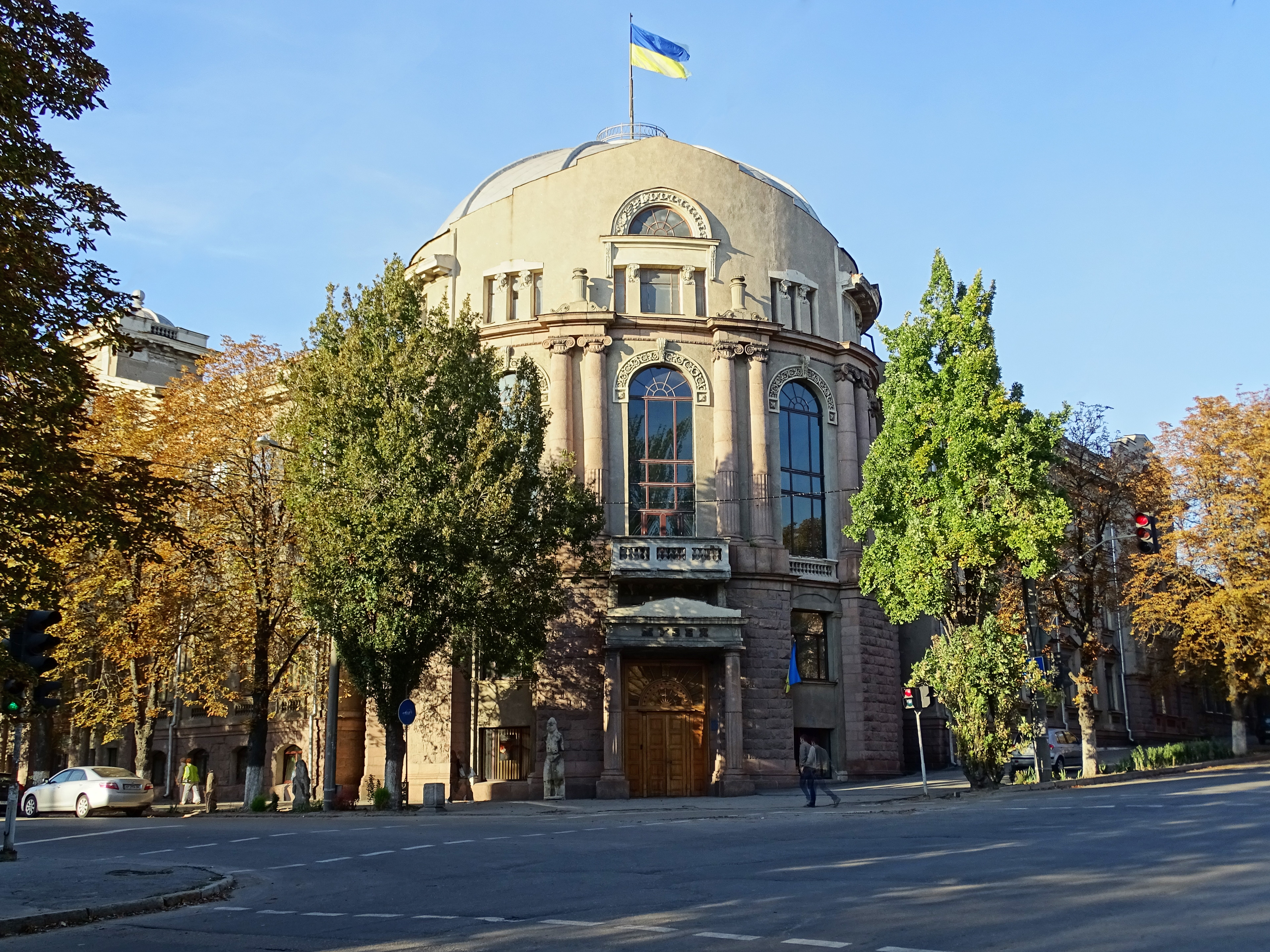 Дворянське зібрання (мур.), де розміщувався штаб 13-ї Армії Південного фронту, Запоріжжя, вул.Чекістів, 29